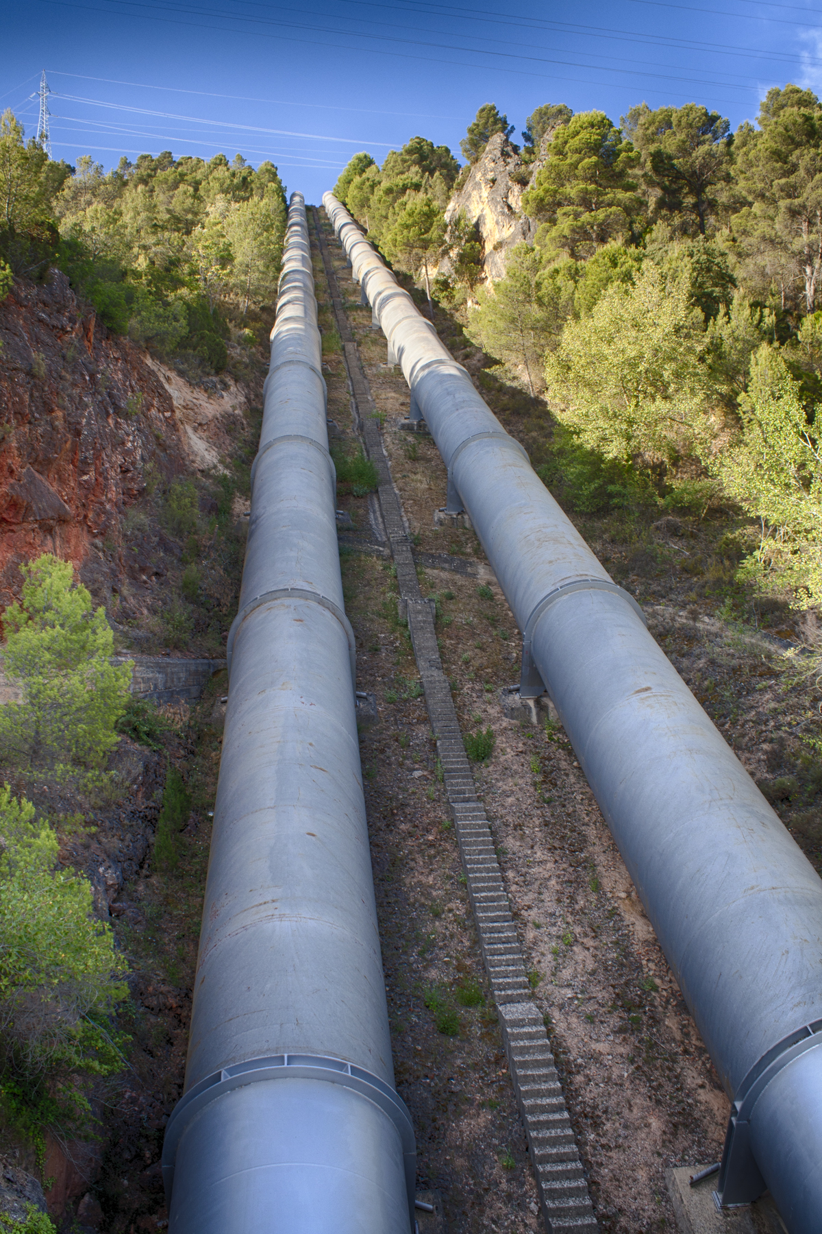 Tuberías para llevar el agua desde el embalse de Bolarque a la presa de Bujeda, donde comienza el trasvase Tajo-Segura El agua es elevada hasta la presa salvando una distancia de 1.070 m y un desnivel de 245 m gracias a 2 tubería de acero de más de 3 m de diámetro. Provincia de Guadalajara Castilla-La Mancha España